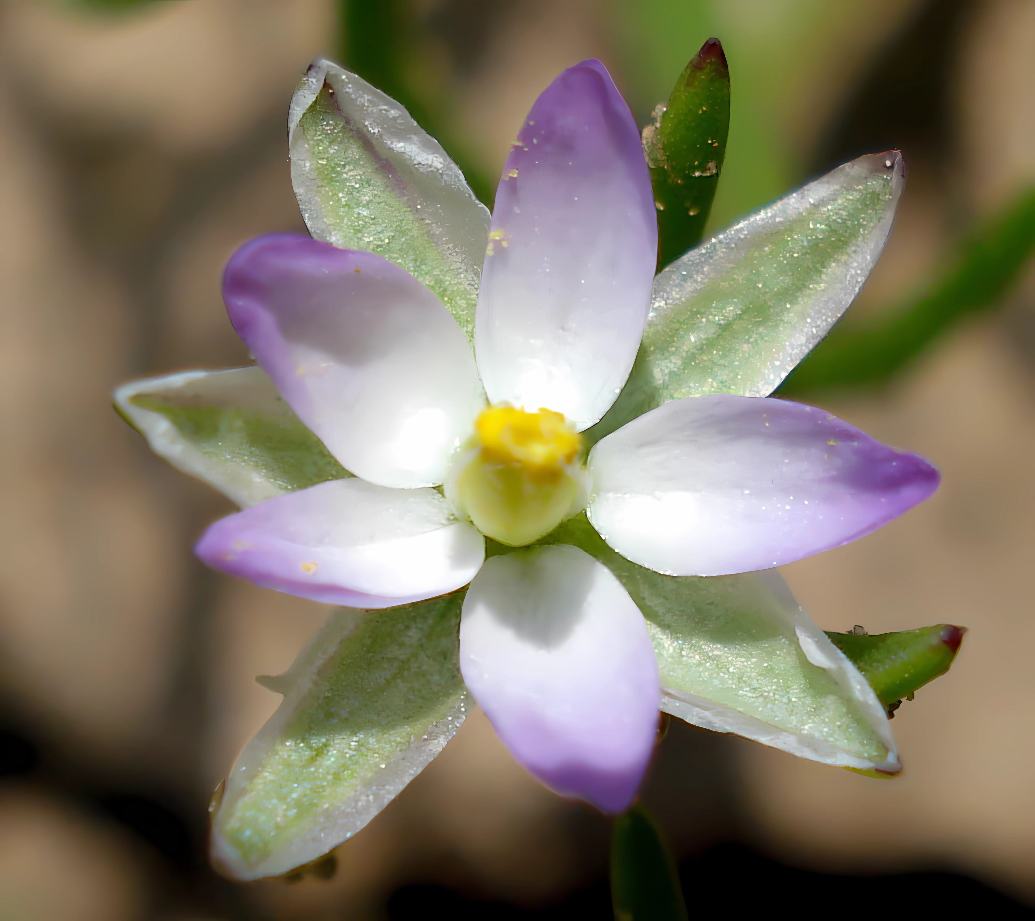 Spergularia salina (Unterfranken, Germany)